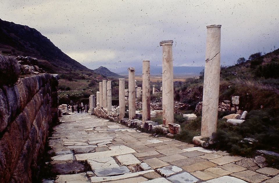 Samsun Amerikan Radar Üssü'nde görevli personellerin Efes gezisi sırasında çektiği fotoğraflardan biri.